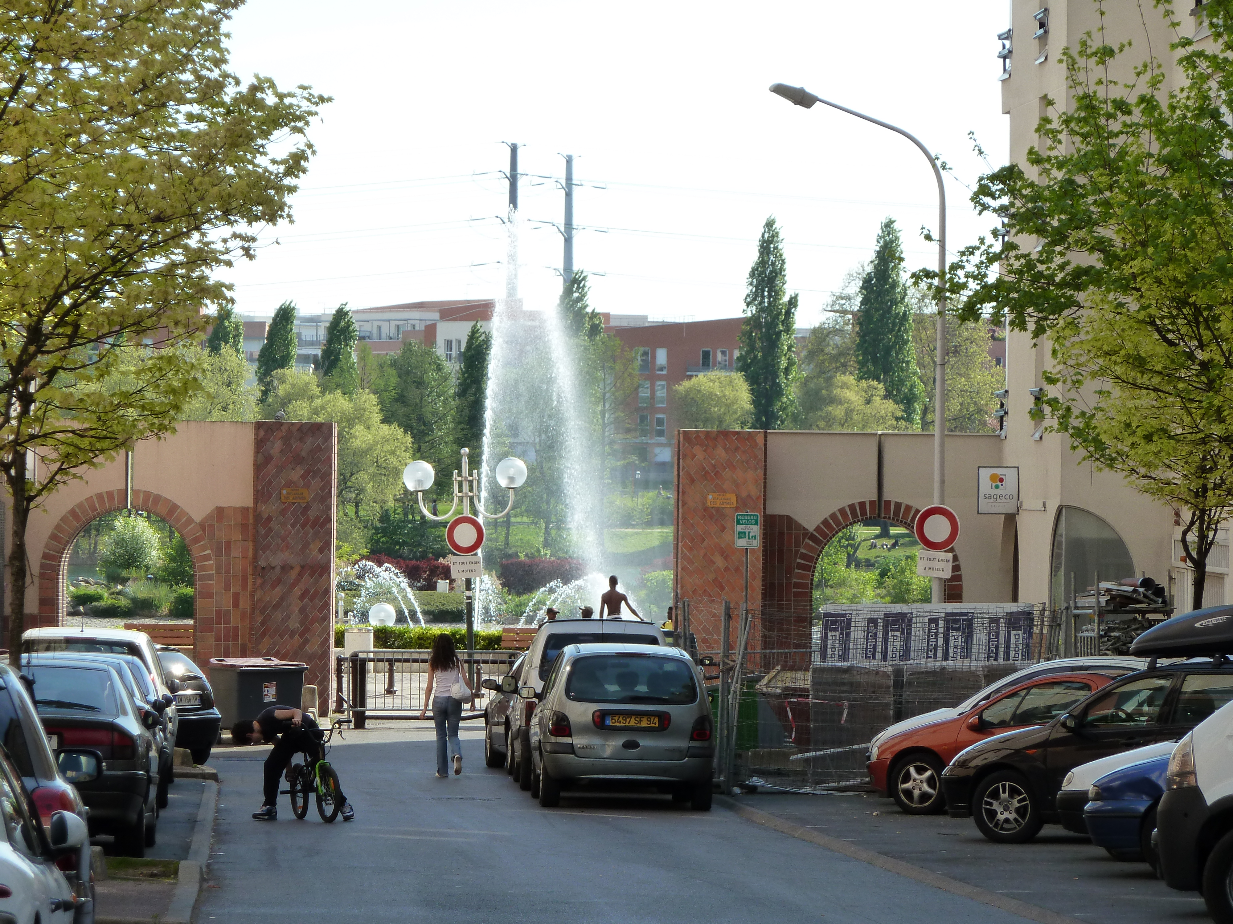 Créteil Rue de Kiryat-Yam (ville jumelée), jet d'eau